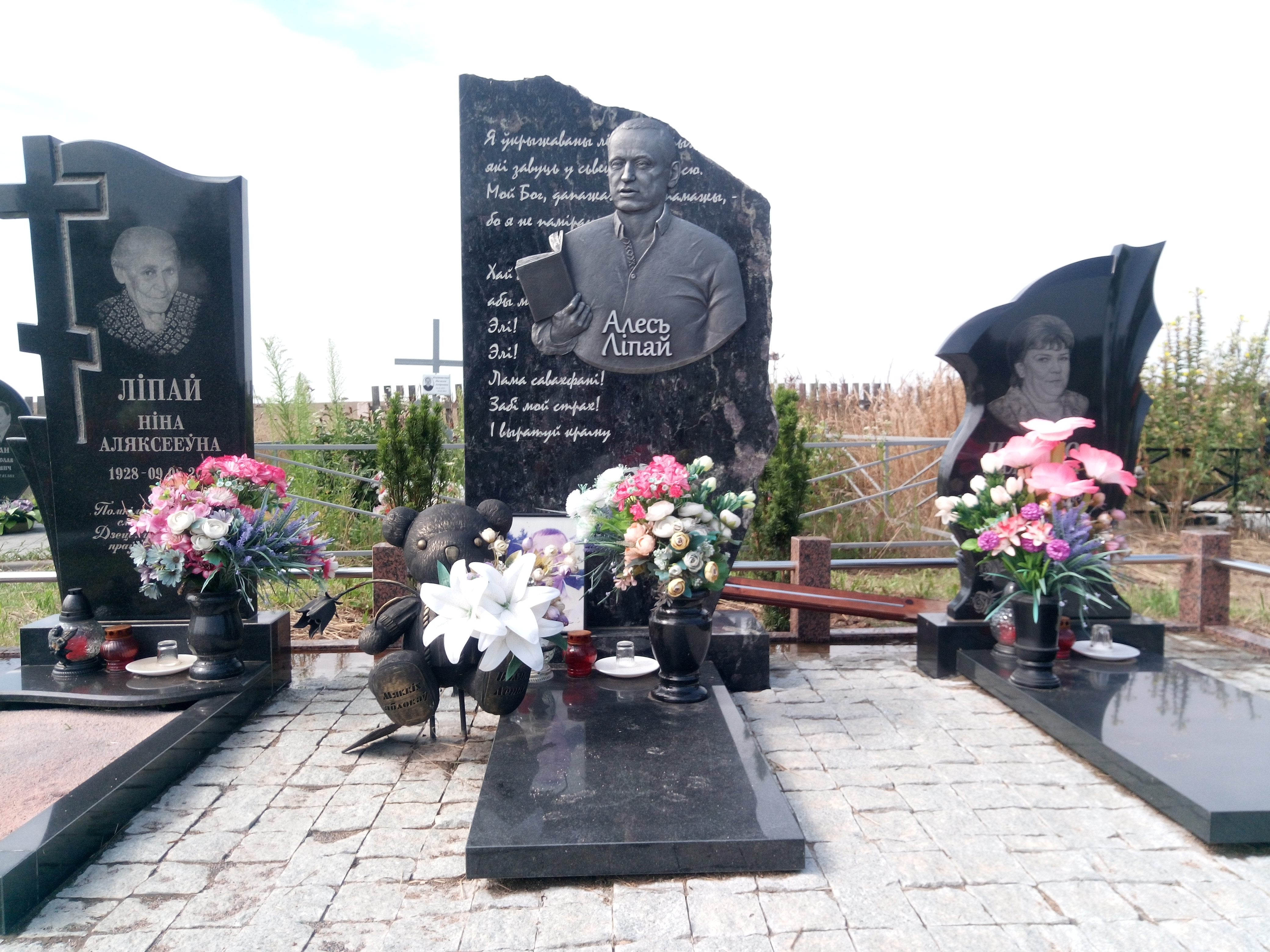 Магіла Алеся Ліпая